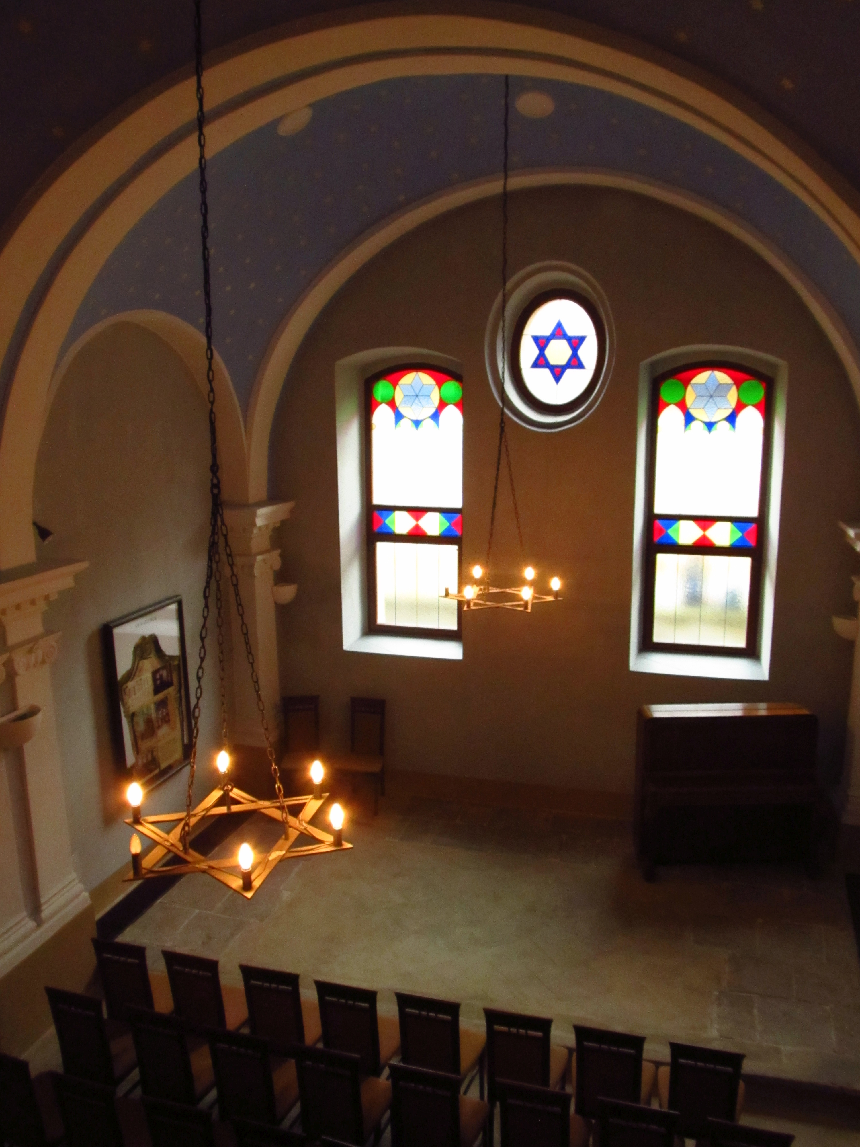 Synagoga (Dobruška), Šubrtovo nám. 646, Dobruška, Dobruška.